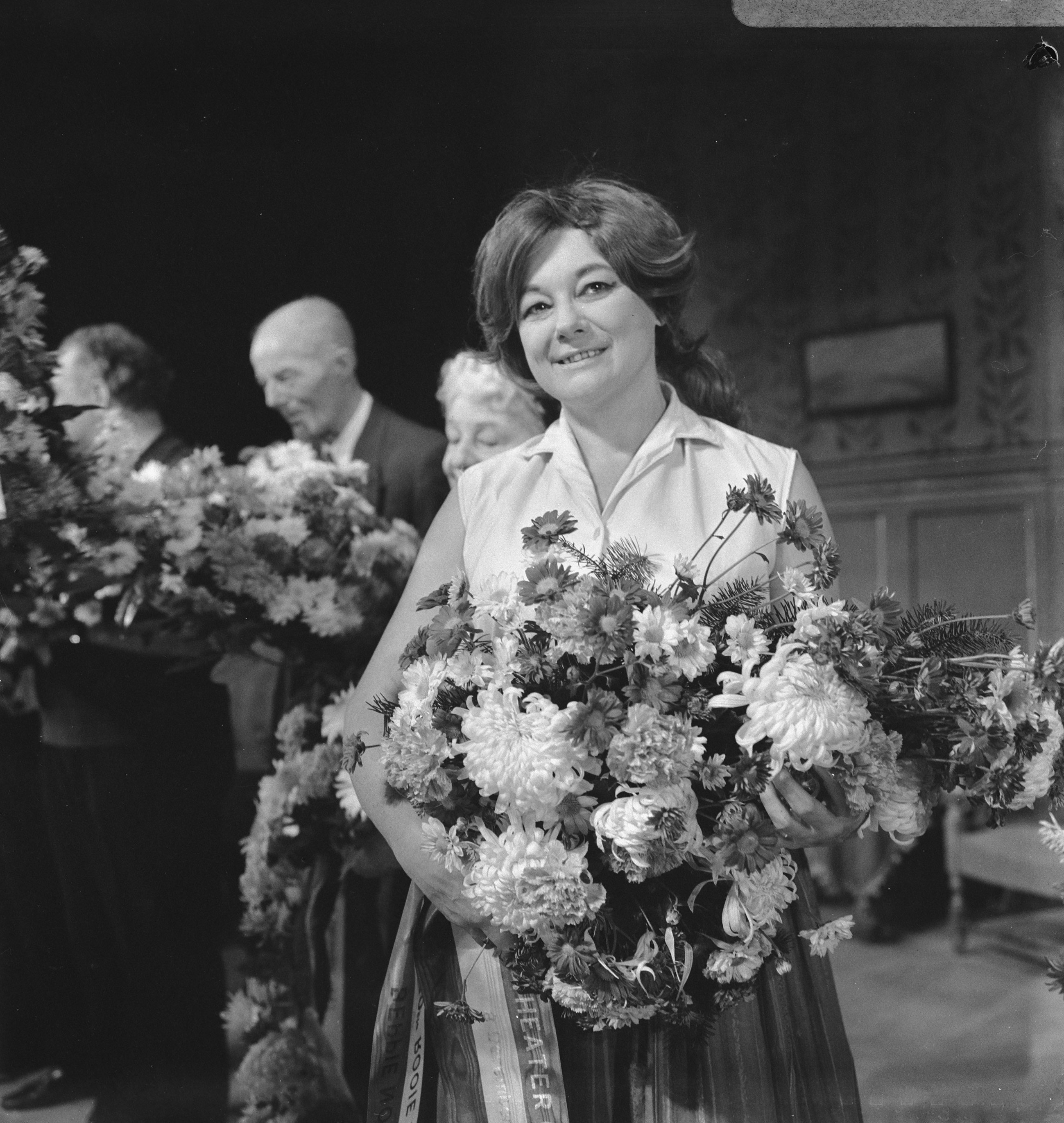 Collectie / Archief : Fotocollectie Anefo Reportage / Serie : [ onbekend ] Beschrijving : Twaalfhonderdvijftig keer Rooie Sien , hoofdrolspeelster Beppie Nooy in de bloemen in Carre Datum : 8 december 1967 Trefwoorden : BLOEMEN Persoonsnaam : Beppie Nooy Instellingsnaam : Carré Fotograaf : Evers, Joost / Anefo Auteursrechthebbende : Nationaal Archief Materiaalsoort : Negatief (zwart/wit) Nummer archiefinventaris : bekijk toegang 2.24.01.03 Bestanddeelnummer : 920-9132